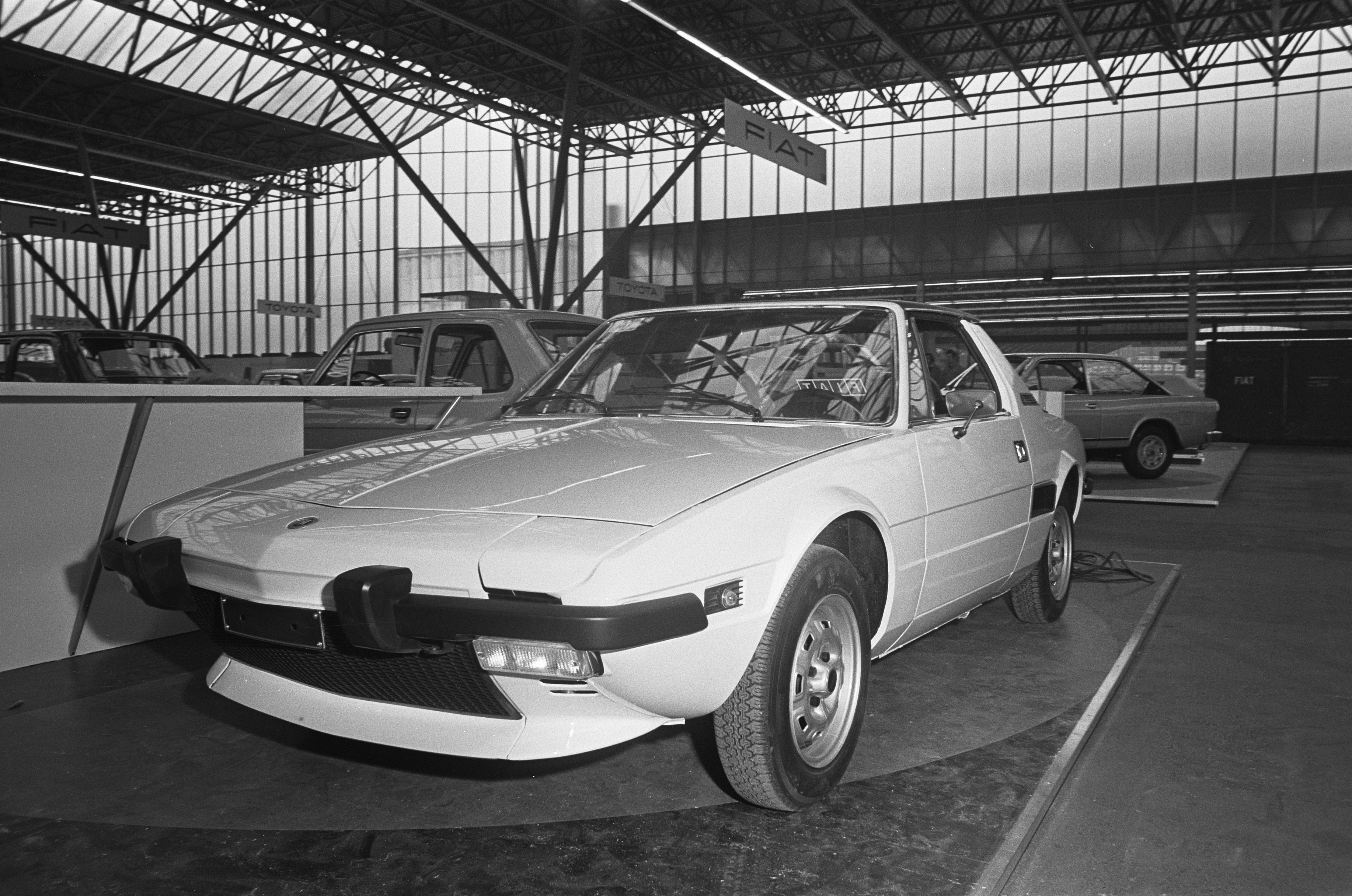 Collectie / Archief : Fotocollectie Anefo Reportage / Serie : [ onbekend ] Beschrijving : Inrichten Personenauto RAI 73 , Fiat X 1/9 Datum : 5 februari 1973 Locatie : Amsterdam, Noord-Holland Trefwoorden : auto's Instellingsnaam : RAI Fotograaf : Mieremet, Rob / Anefo Auteursrechthebbende : Nationaal Archief Materiaalsoort : Negatief (zwart/wit) Nummer archiefinventaris : bekijk toegang 2.24.01.05 Bestanddeelnummer : 926-2015